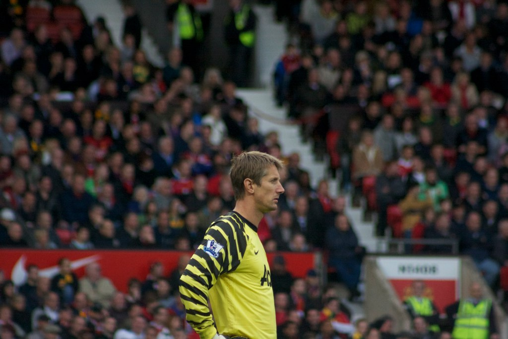 _MG_8134